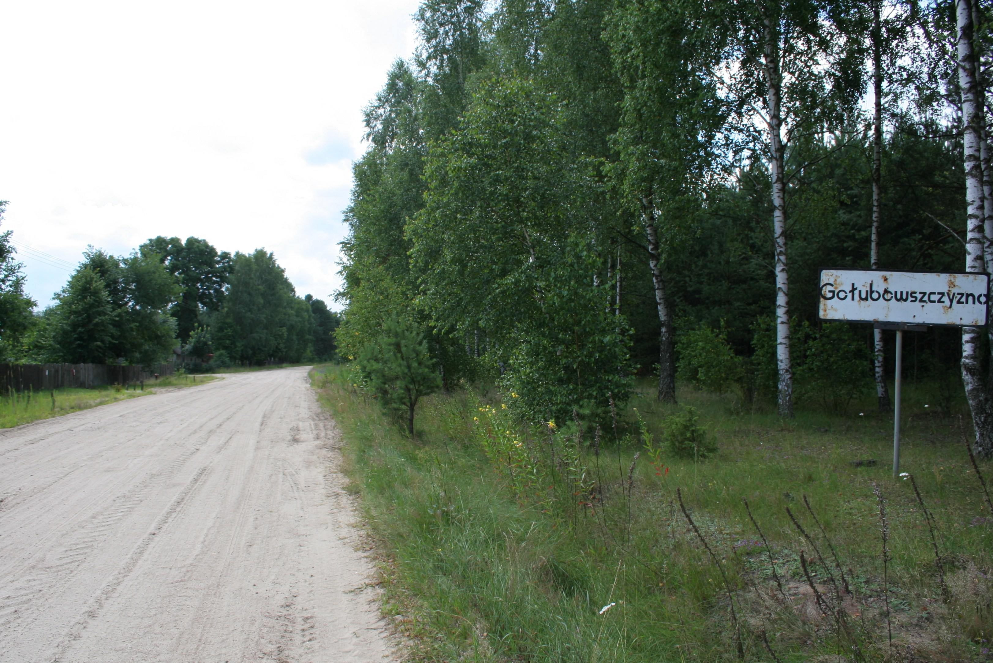 Droga wjazdowa do Gołubowszczyzny.